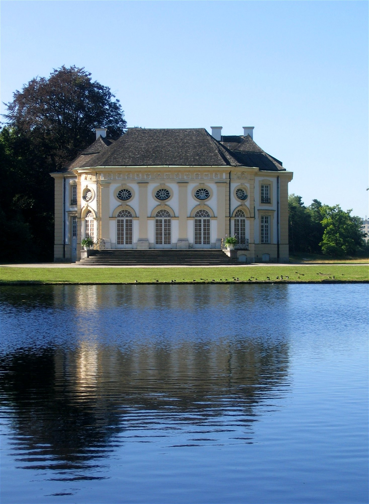 Badenburg im Schlosspark Nymphenburg, Muenchen